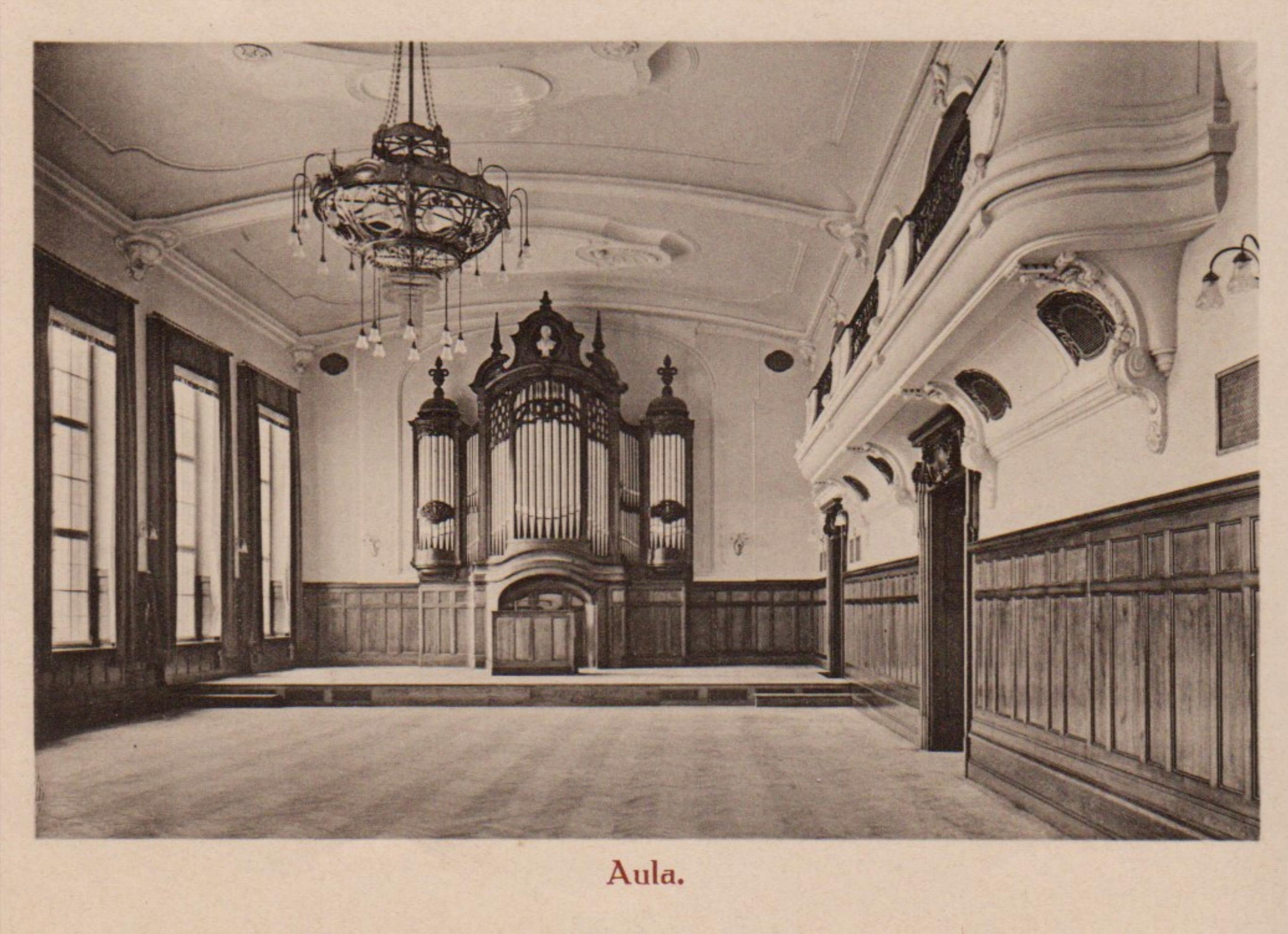 Dresden, Königliches Lehrerseminar Dresden-Strehlen (nach Wiederaufbau TU-Gebäude am Weberplatz) – Aula mit Orgel 1910